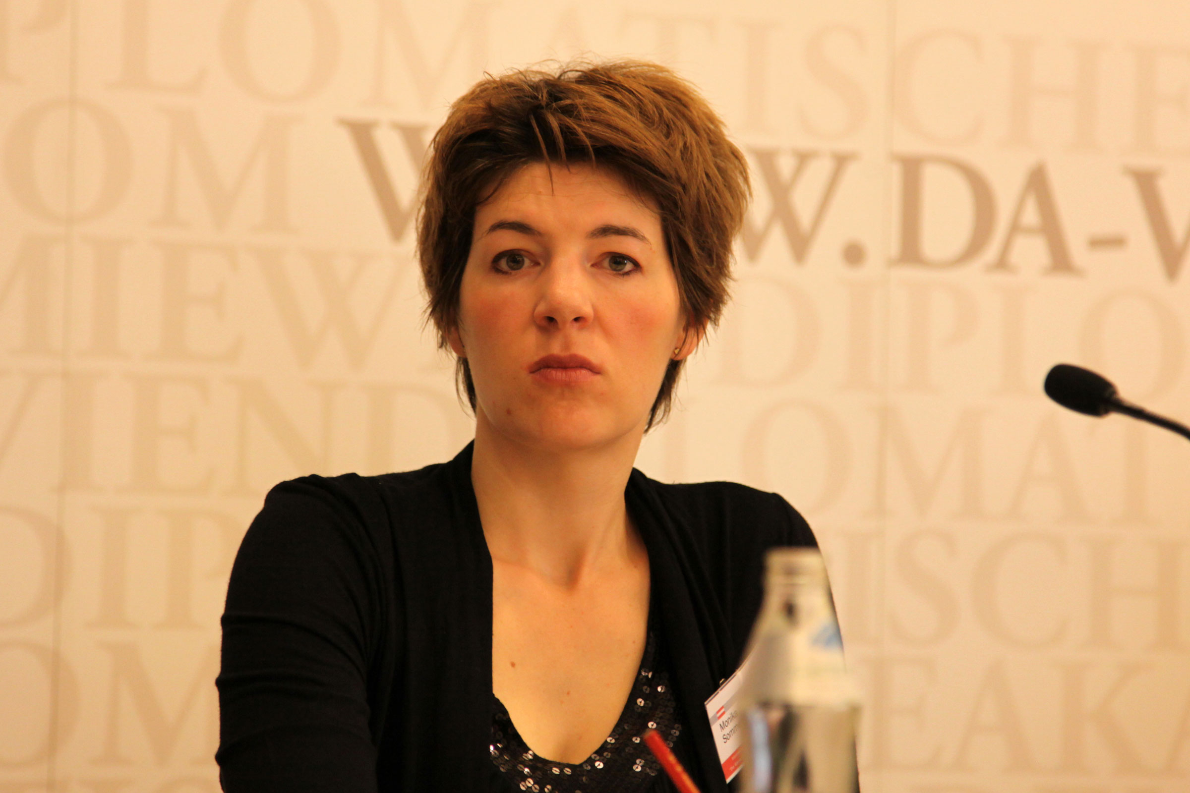 Sommer.Monika-110520-9027